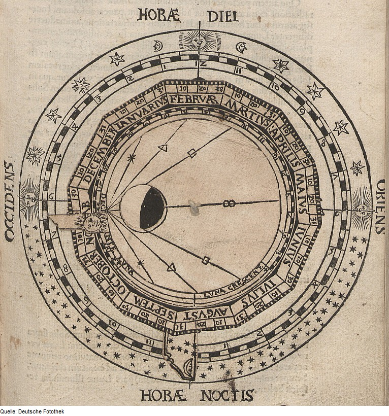 Original image description from the Deutsche FotothekAstronomie & Erde & Mond & Instrument